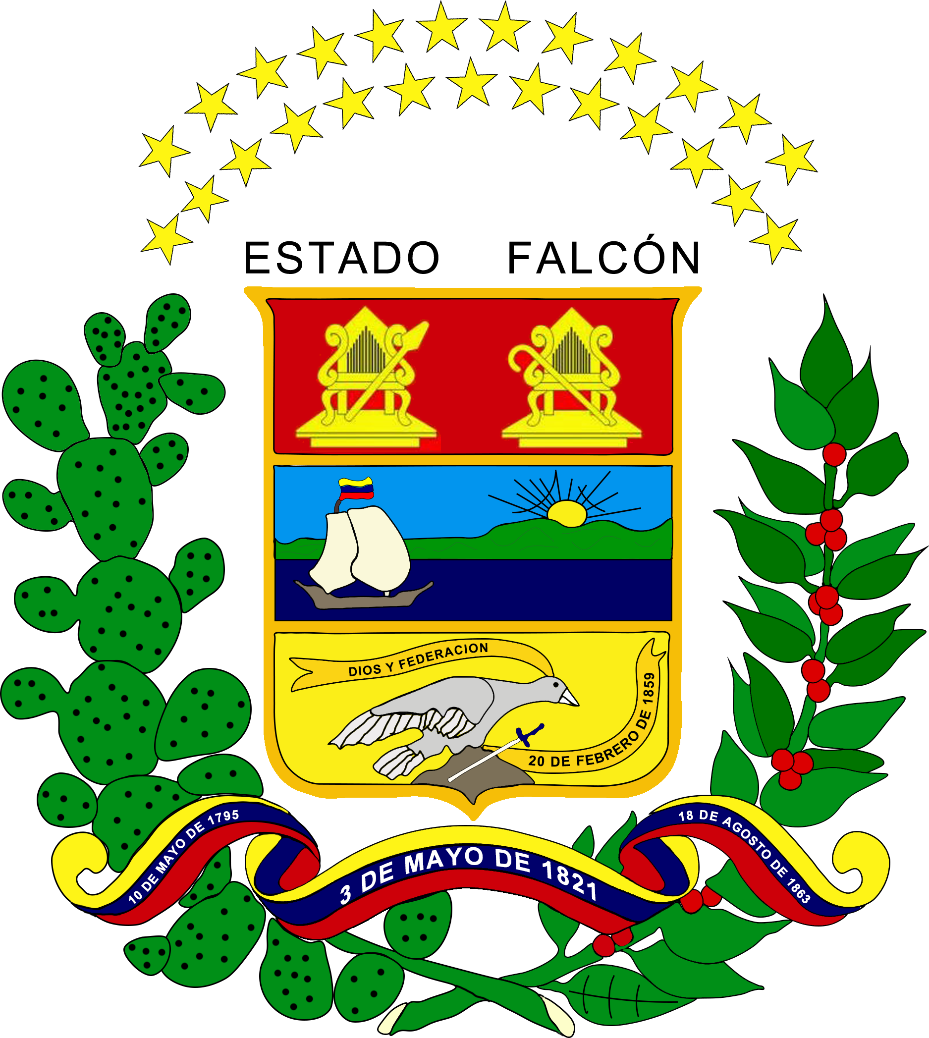 Escudo Estado Falcon.